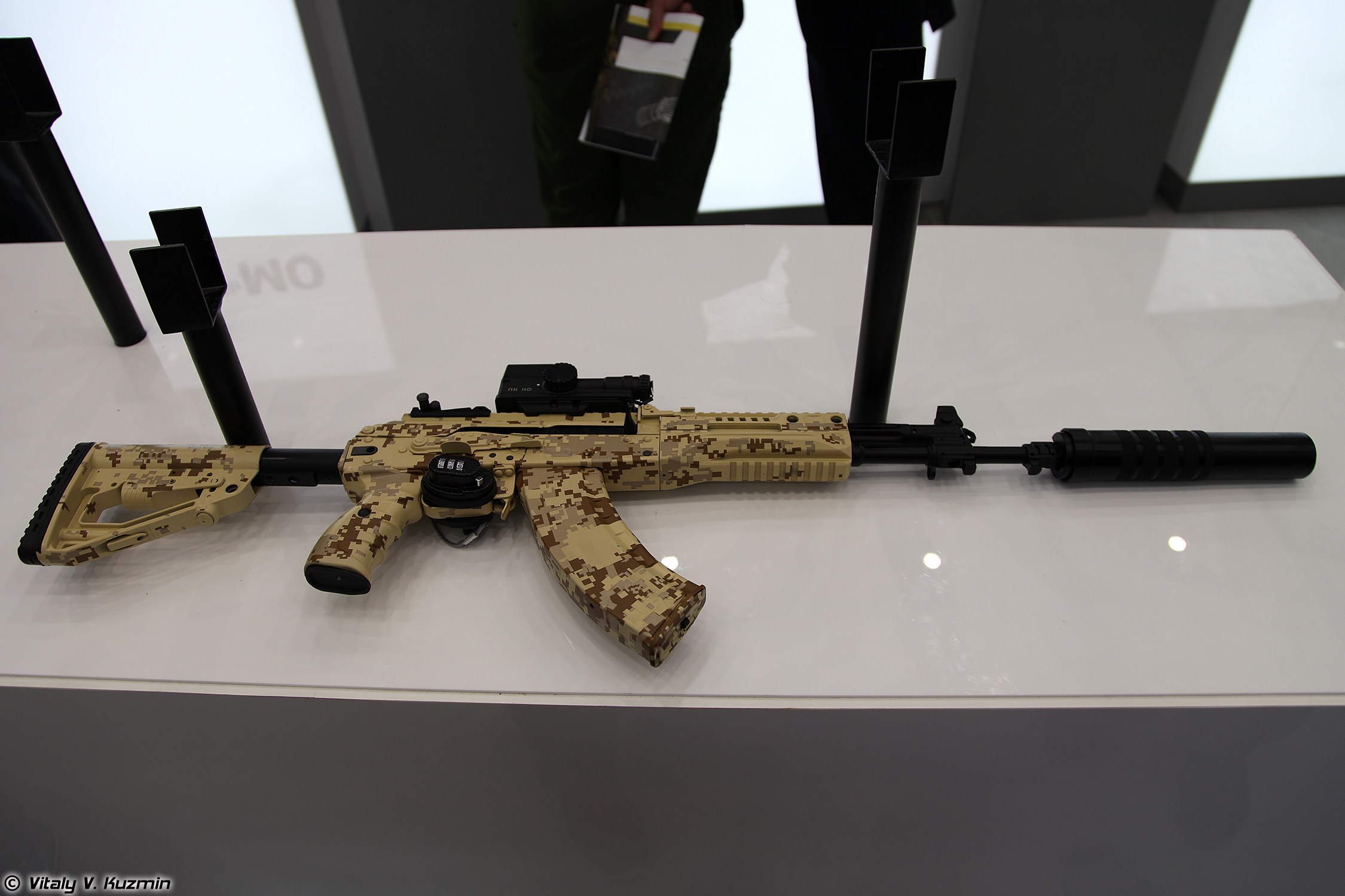 7,62х39 автомат АК-15 6П71